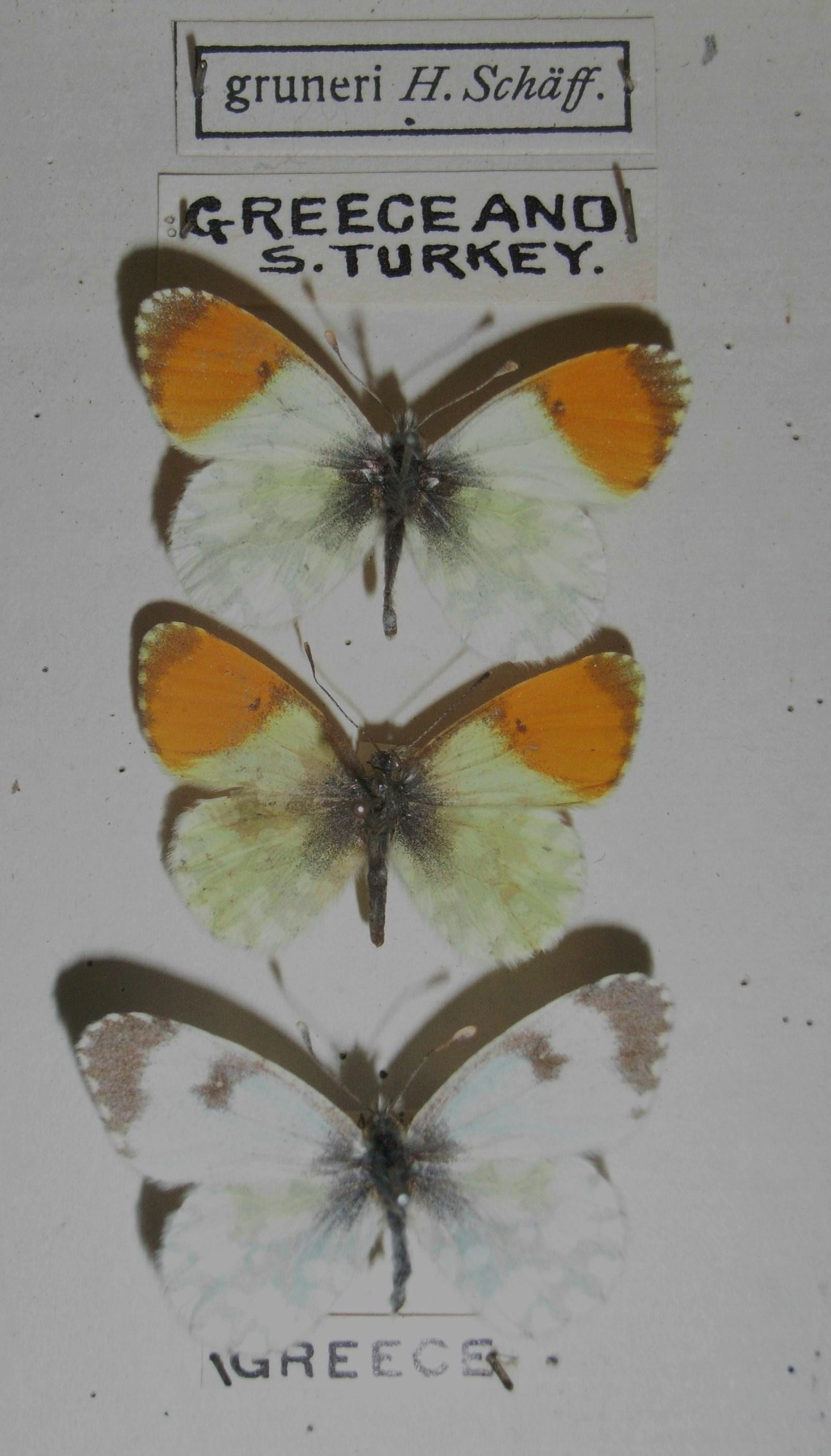 Anthocharis gruneri